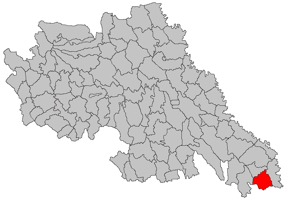 Categorie:Hărţi ale judeţului Iaşi